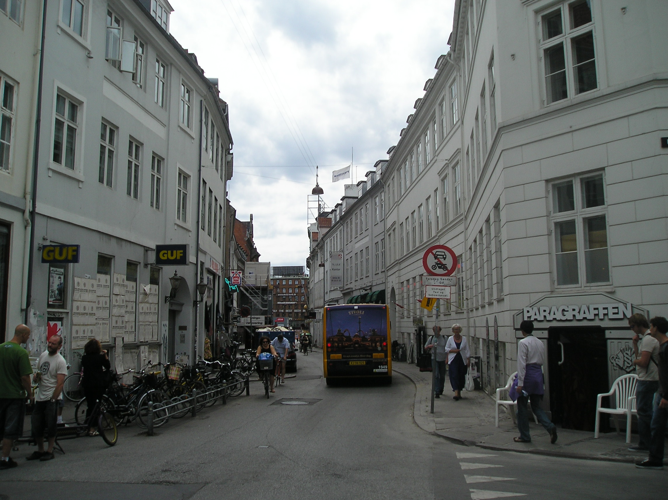 The street Vestergade in Copenhagen.